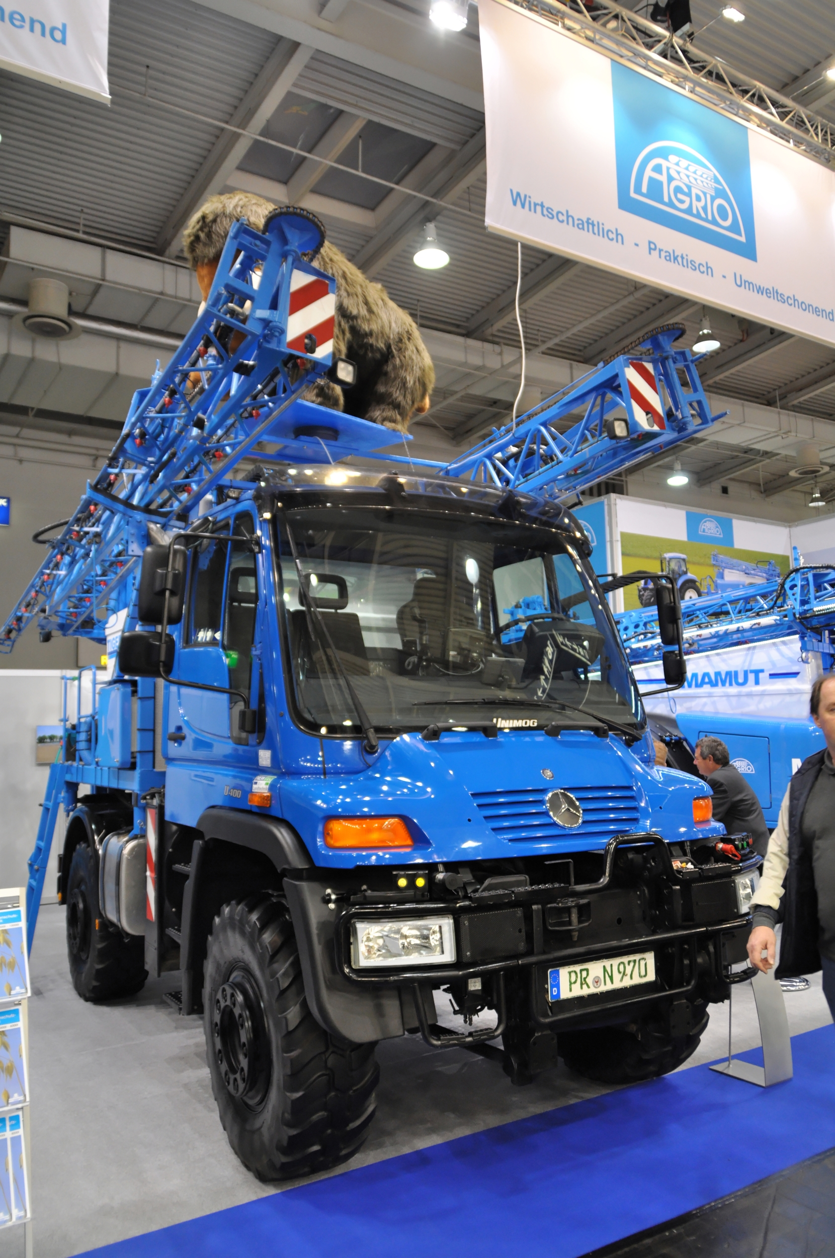 Unimog U 400 mit Aufbauspritze Tiger Topline von Agrio, Agritechnica 2011 Dieses Foto entstand durch die Mithilfe der Wikimedia Deutschland e. V. bei der Akkreditierung als Fotograf. Wikimedia Deutschland e. V. hilft den Freiwilligen der Wikipedia bei der Erstellung von freien Inhalten.